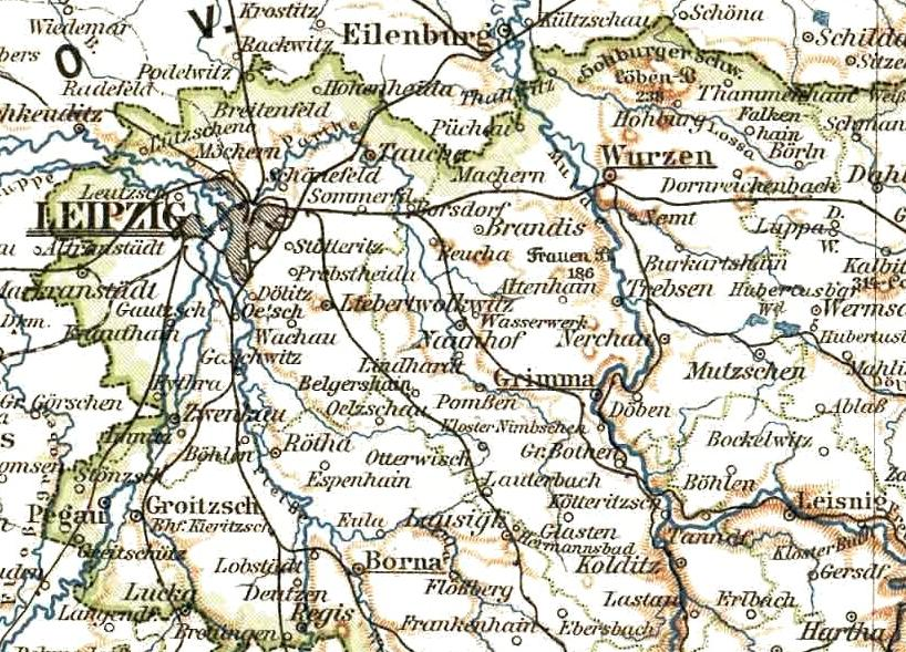 Lage AHS Grimma